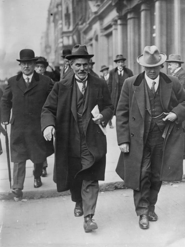 Sie werden in den nächsten Wochen Deutschlands Gäste sein! Der englische Premierminister Mac Donald (Mitte) und der englische Aussenminister Henderson (links), welche zu wichtigen Besprechungen nach Berlin kommen.